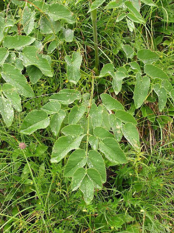 Blatt von Laserpitium latifolium. Aufgenommen bei Oberlech im Lechtal (Österreich)